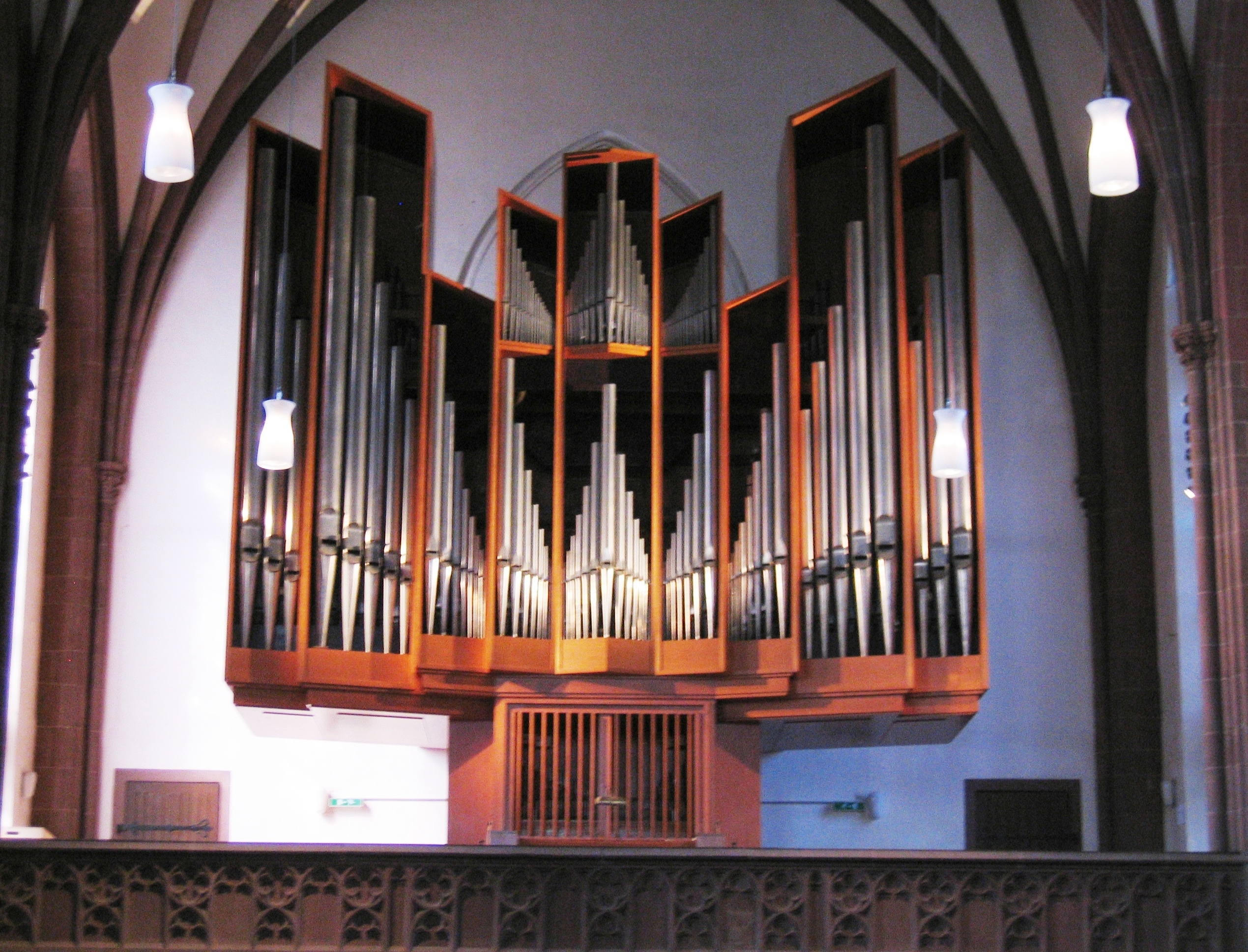 Schuke Orgel der Dreikönigskirche (Frankfurt).